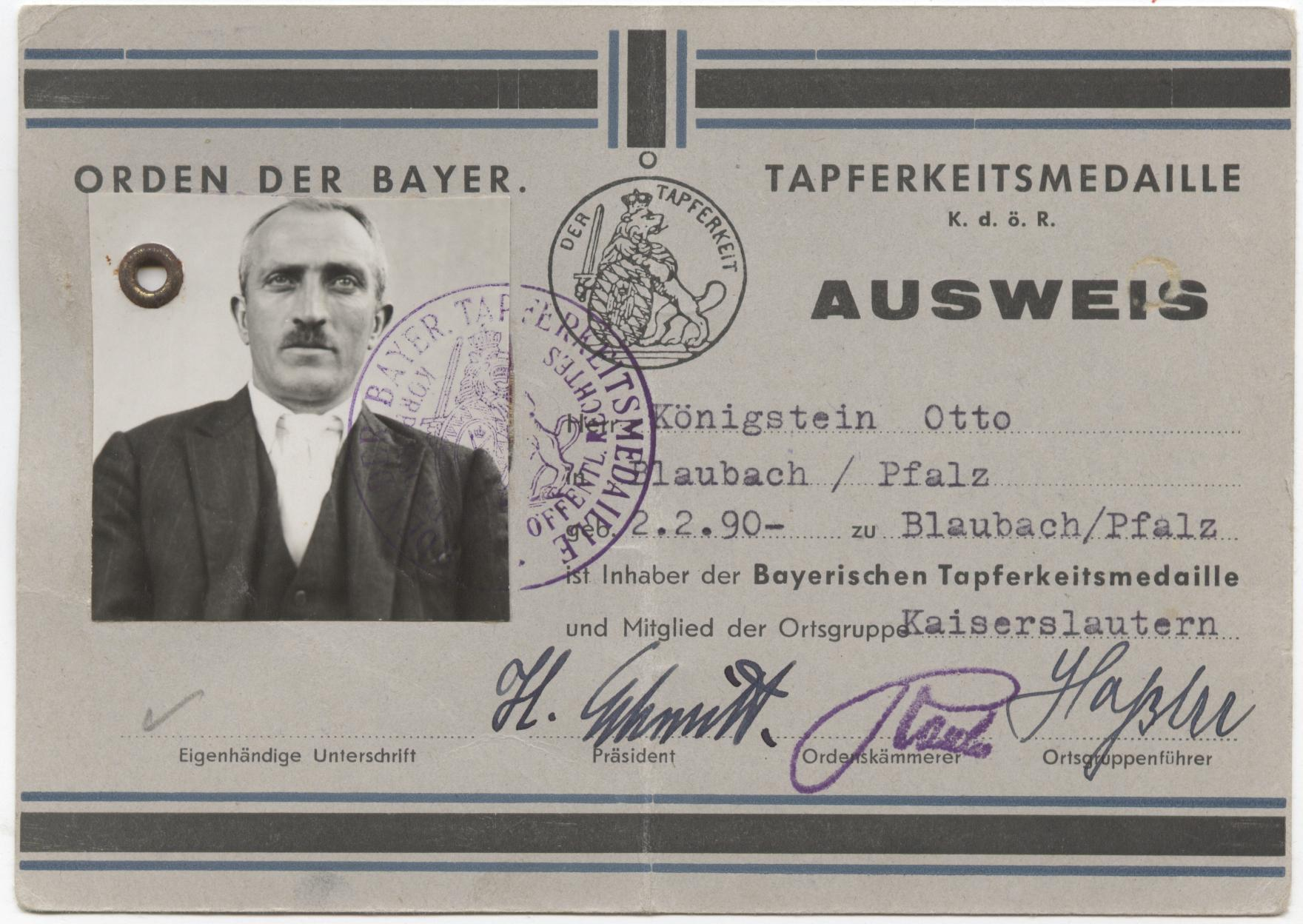 ID-Card Member of the Bavarian Bravery Medal